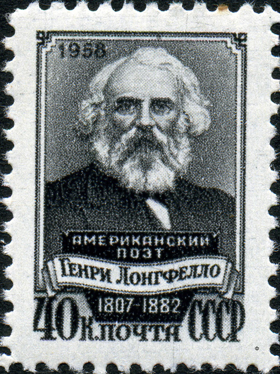 Марка СССР